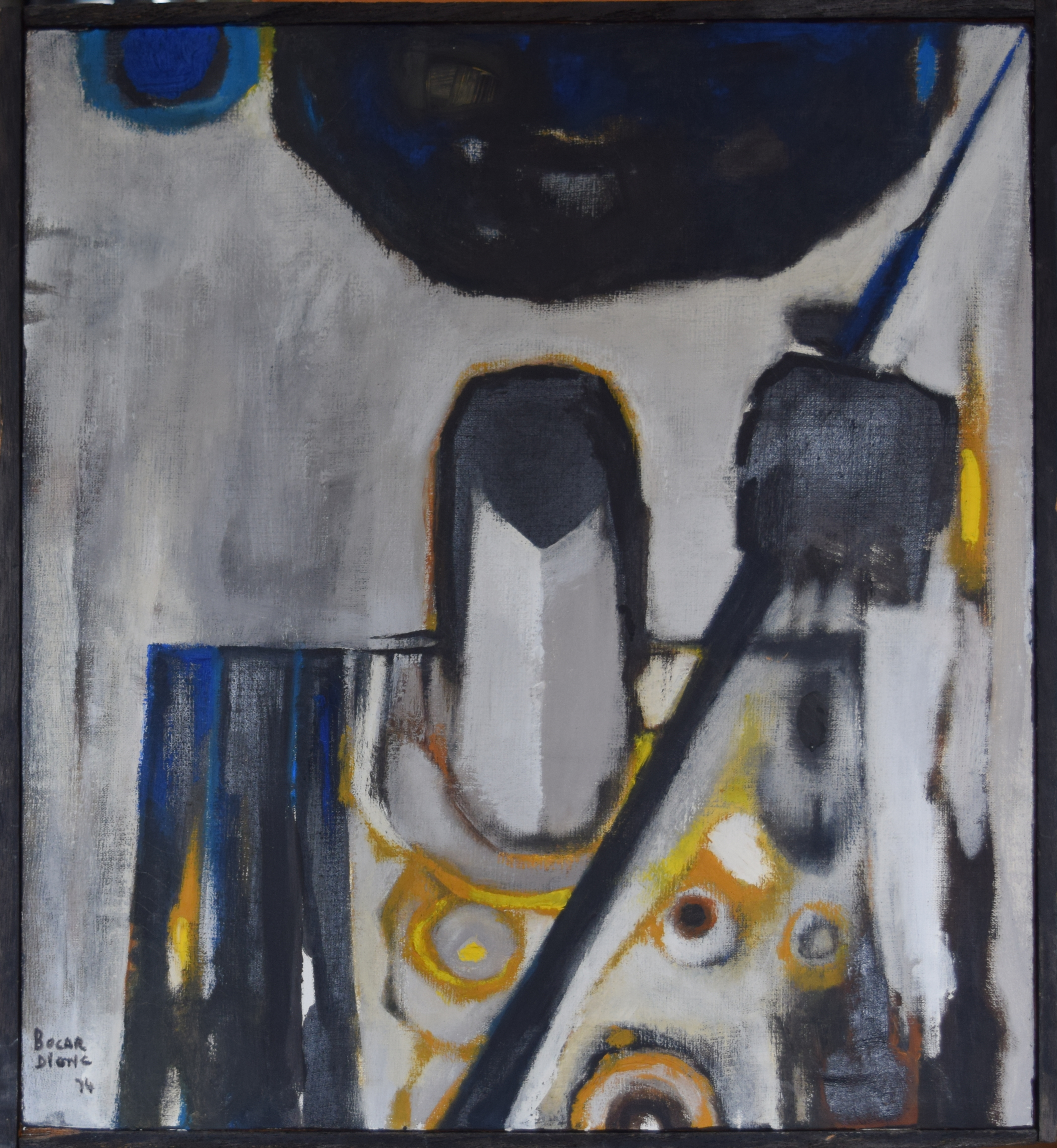 L'image est une photo de l'oeuvre peinte sur toile de Bocar Pathé Diong, un des artistes peintres du premier groupe de "l'école de Dakar". Elle représente un guerrier stylisé brandissant ,légèrement de biais, une lance. L'ensemble de l'oeuvre joue sur le thème du bleu avec des dominantes de bleue, un fond gris bleu et quelques touches de jaune. J'ai pris moi-même cette photo d'un tableau que j'ai acheté à son auteur, Bocar Pathé Diong, en 1974. L'article de Wikipédia relatif à ce peintre décédé fait état du souhait de le compléter par une photo d'une oeuvre de l'artiste. Je suis le possesseur d'une telle oeuvre, assez représentative de son style pour la période concernée.